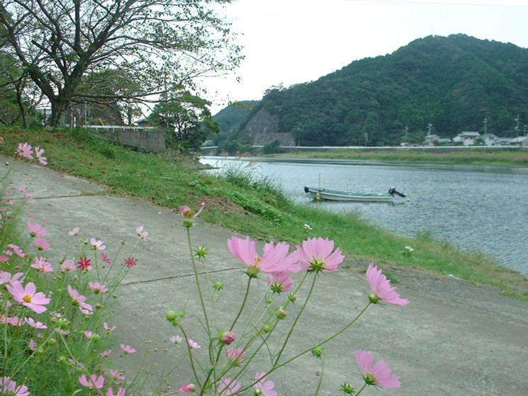 古座川 和歌山県ja:古座川町高池付近にて